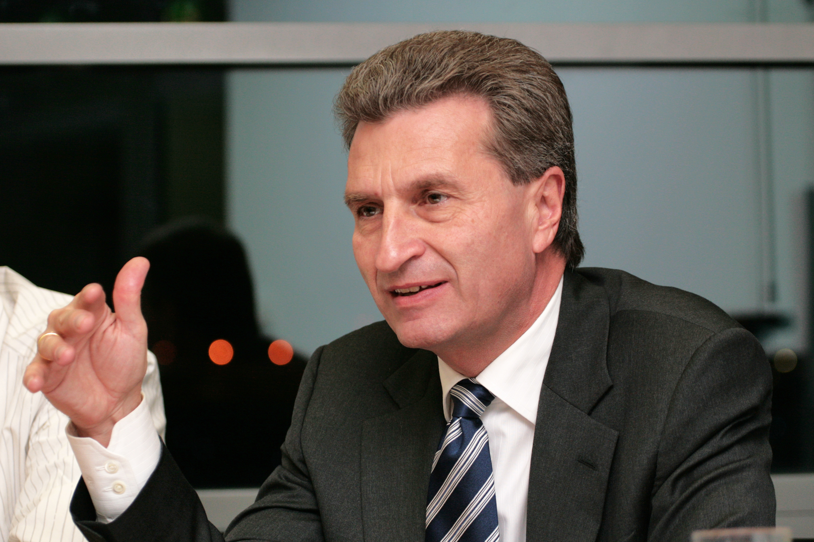 Günther H. Oettinger, prime minister of Baden-Württemberg